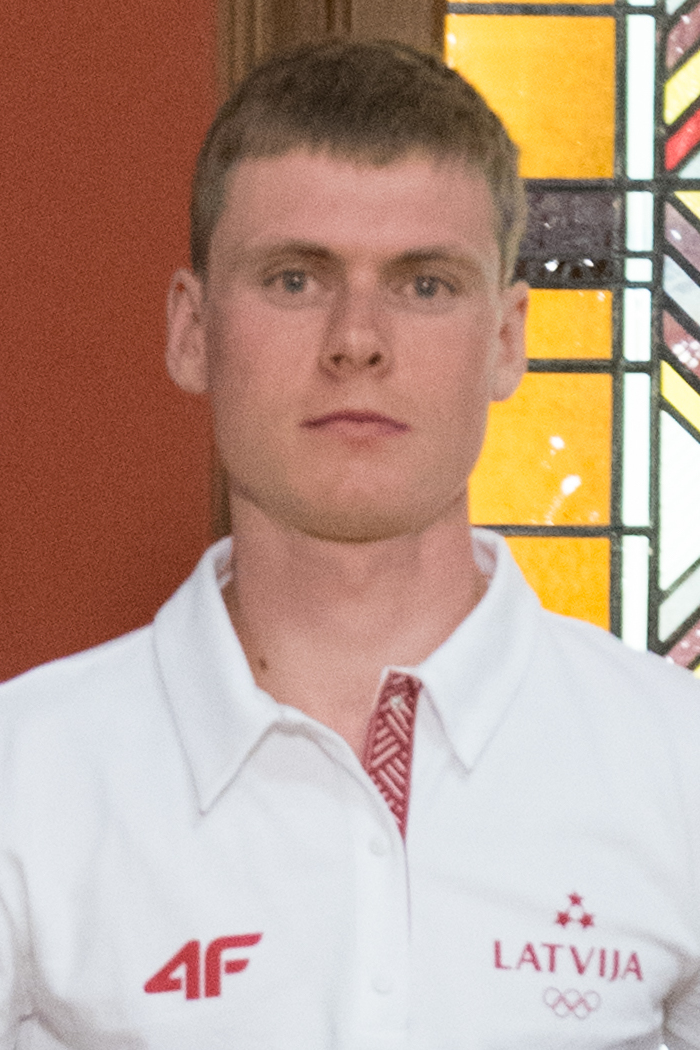 2018.gada 7.maijs. Svinīgais pasākums par godu Latvijas olimpiskās komandas “Phjončhana 2018” un Latvijas paralimpiešu augstajiem sasniegumiem un Latvijas vārda nešanu pasaulē. Foto: Ieva Ābele, Saeima Izmantošanas noteikumi: saeima.lv/lv/autortiesibas